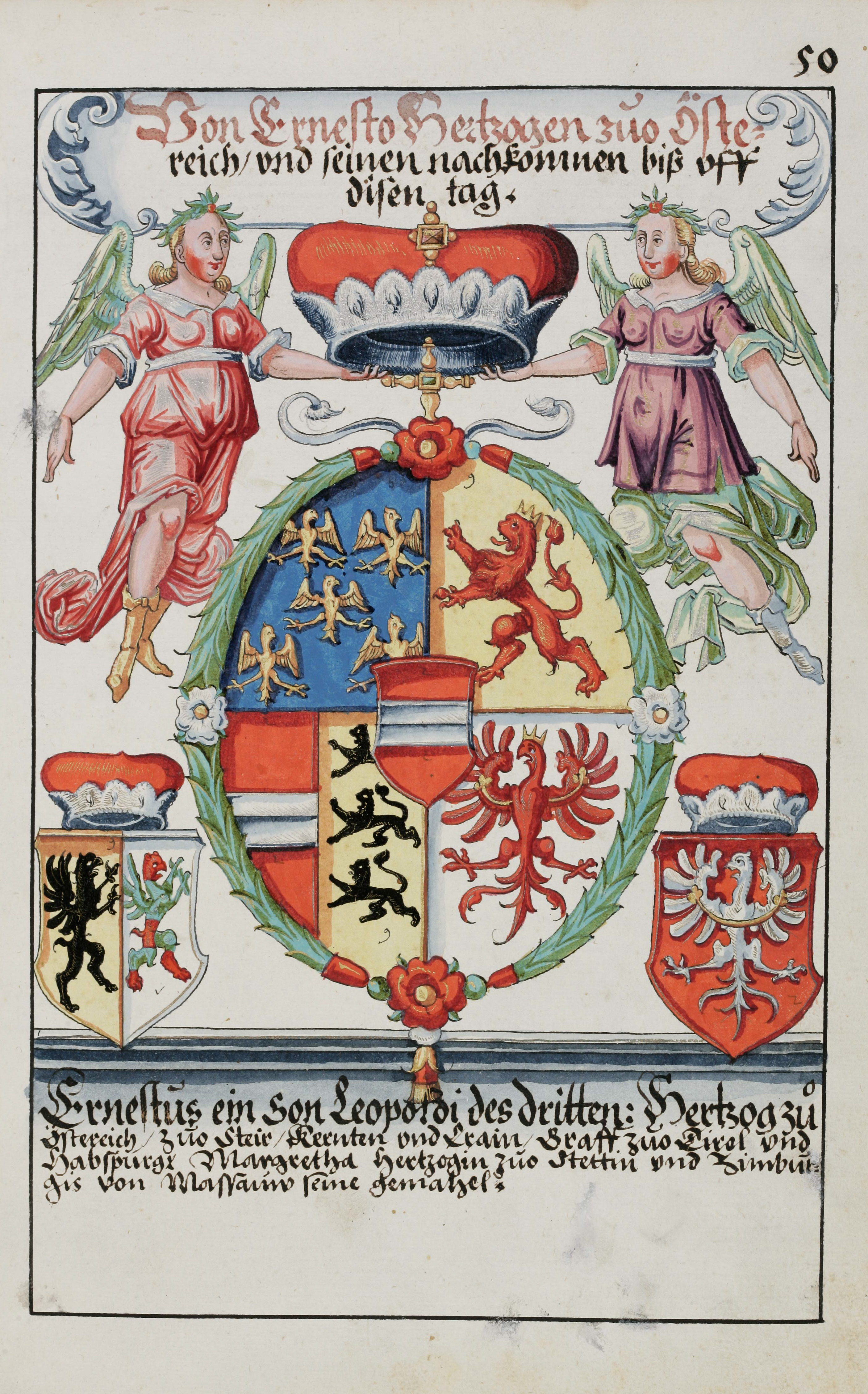 Wappenbuch des Hans Ulrich Fisch. Papier, 31.5 x 19.5 cm, Aarau 1627. Aarau, Staatsarchiv Aargau, V/4-1985/0001, fol. 50r